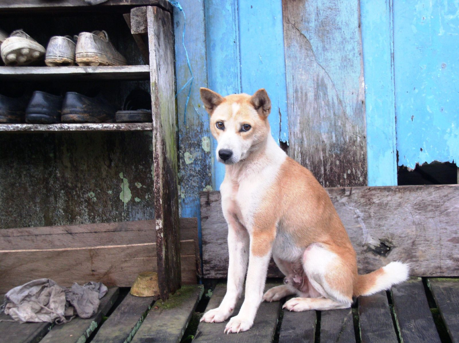 Borneo dog (a.k.a. Iban hunting dog)